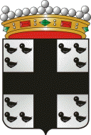 Wapen van Izegem